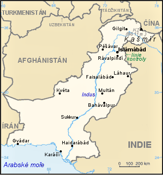 Orientační mapa Pákistánu.